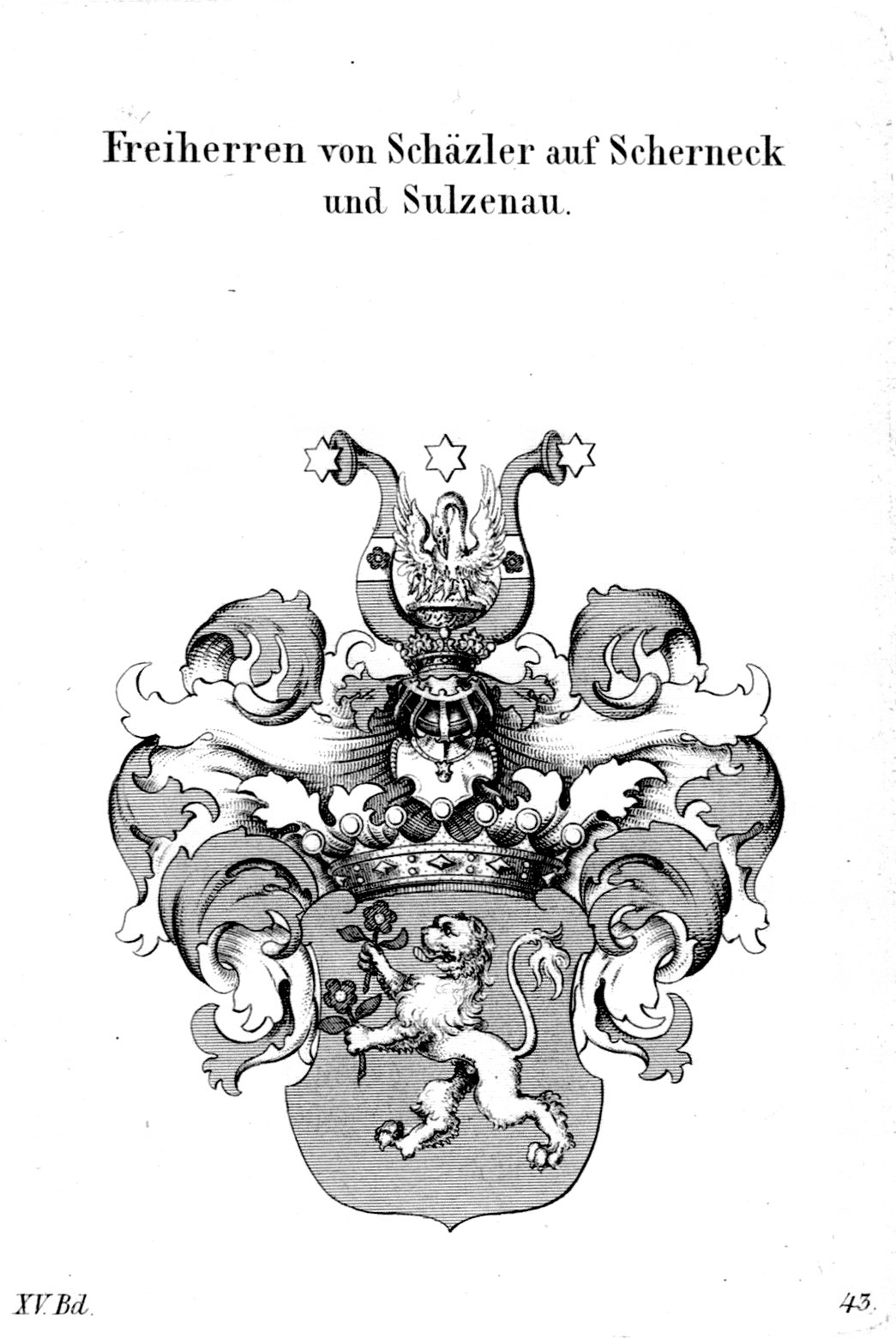 Wappen der Freiherren von Schaezler auf Scherneck und Sulzenau, aus einem Wappenbuch